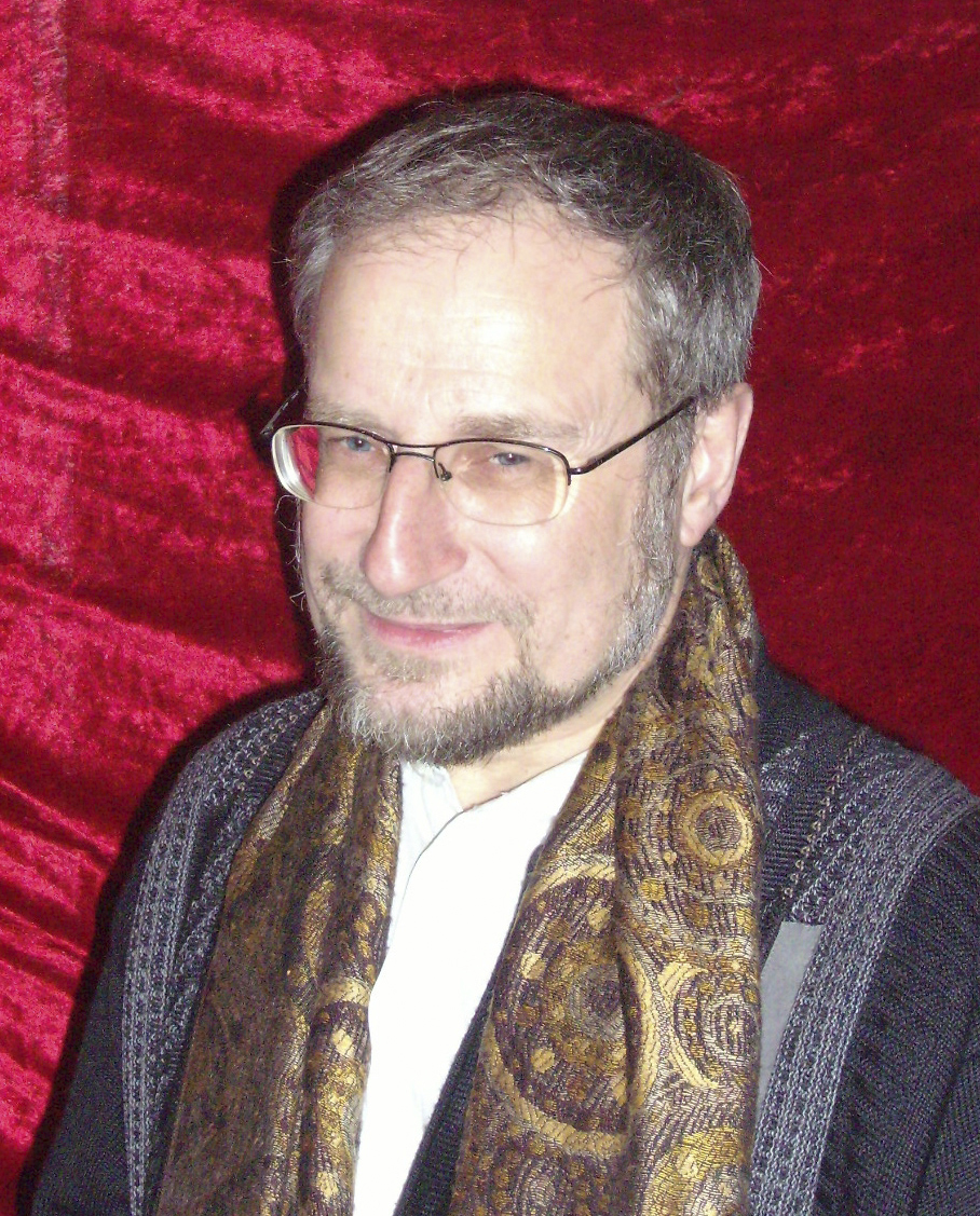 Christoph Auffarth (* 14. Dezember 1951 in Mannheim), deutscher Religionswissenschafter und Theologe, Professor an der Universität Bremen.